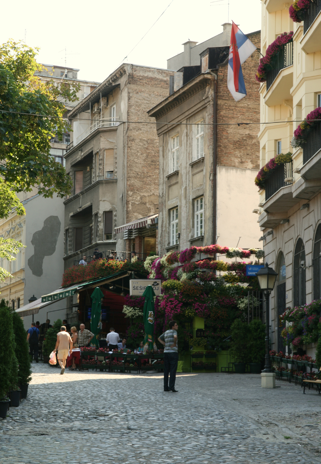 Rue Skardaska à Belgrade